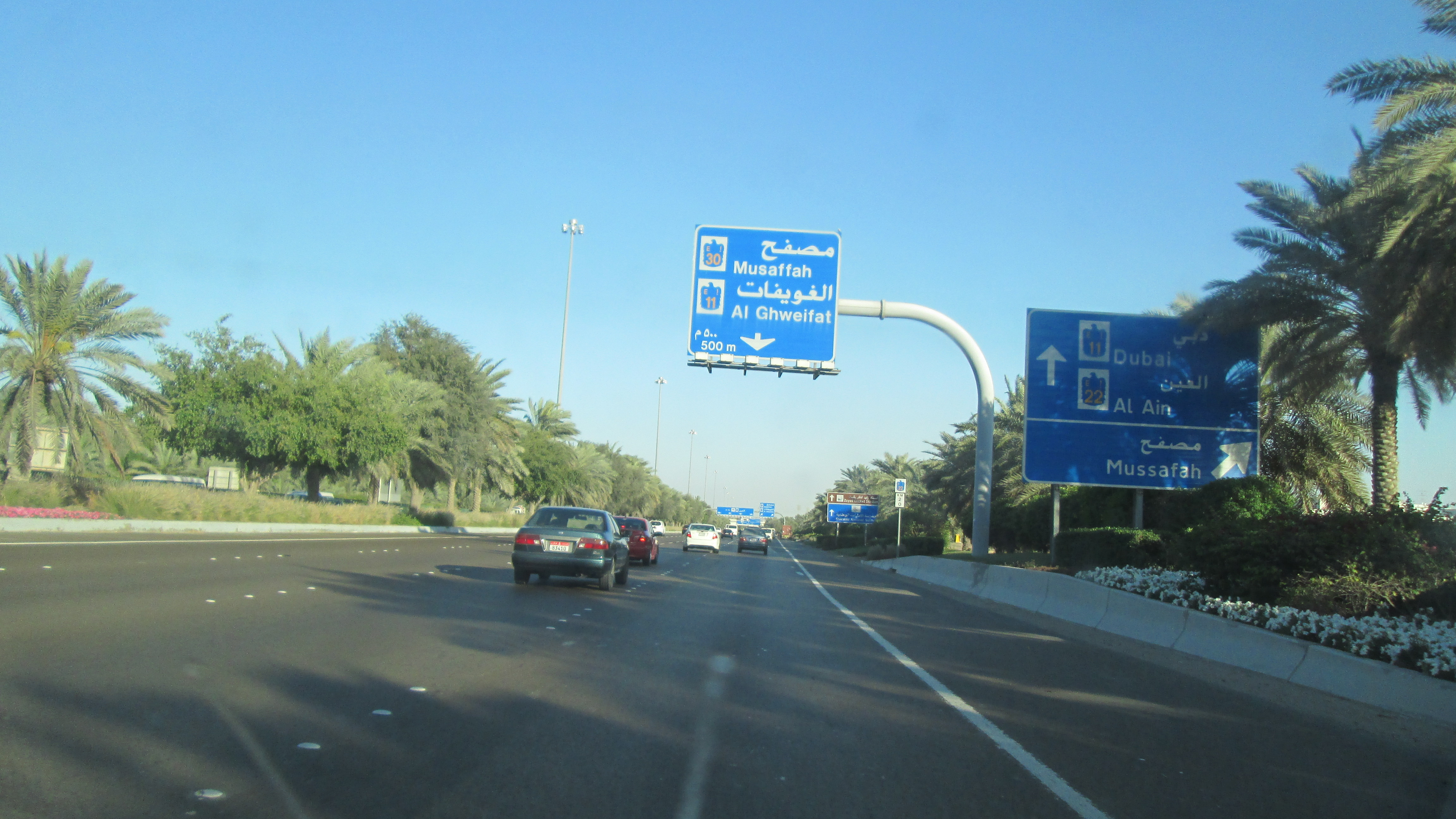 Emaret road Dubai to Abudhabi 2013 pic 464